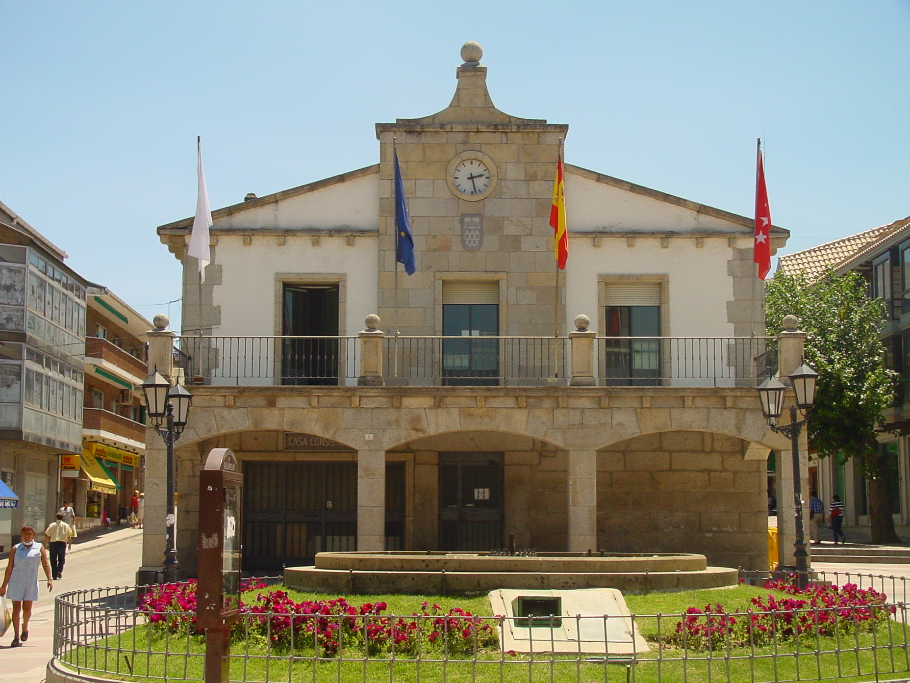 Ayuntamiento de Galapagar.